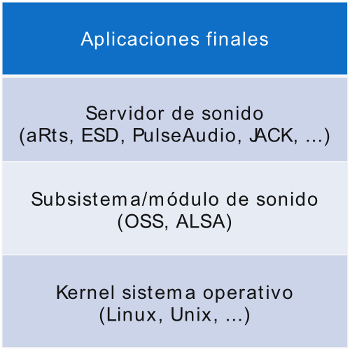 Descripción de las capas que utiliza un servidor de sonido.